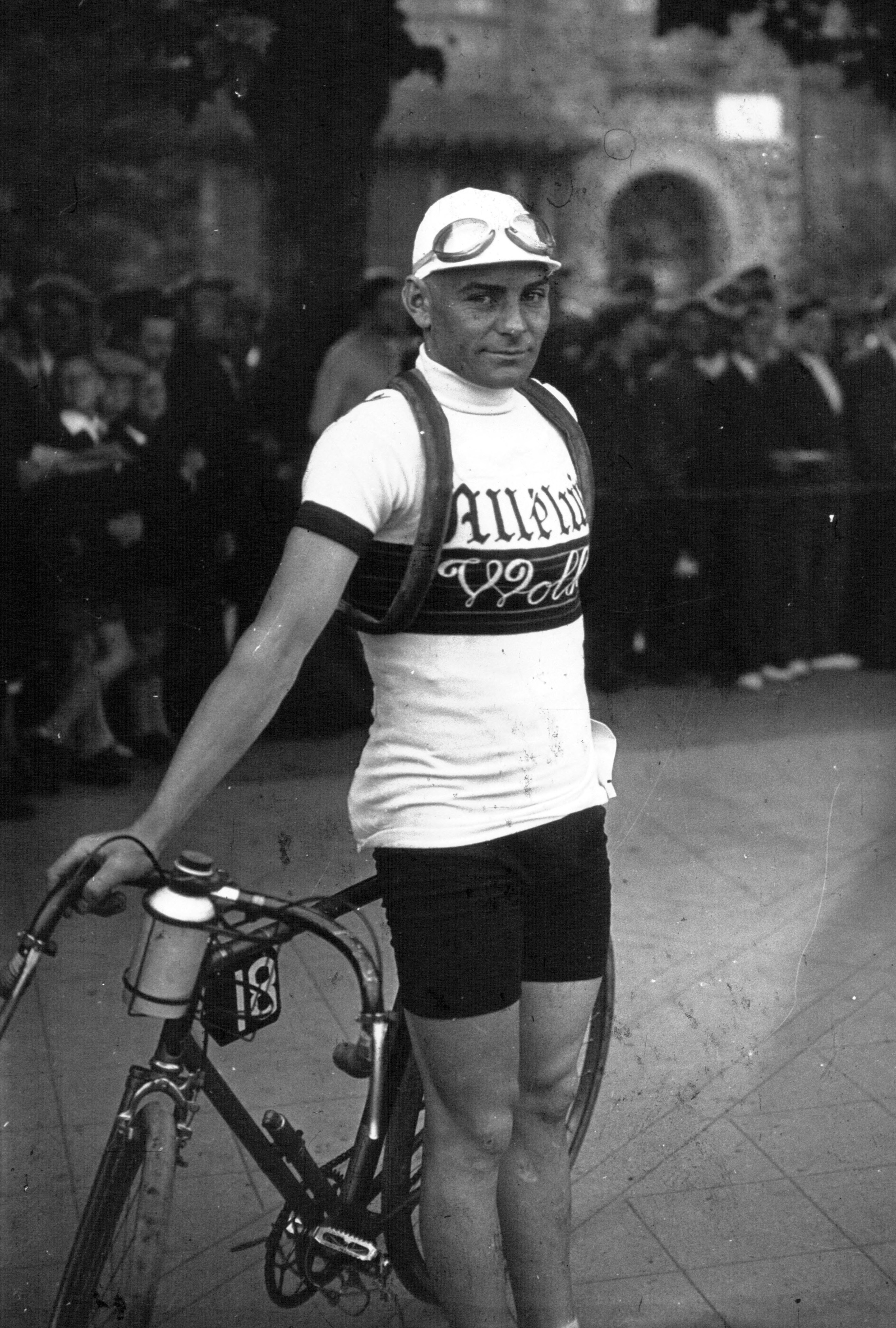 Grand Prix Wolber 1931 : Léon Le Calvez